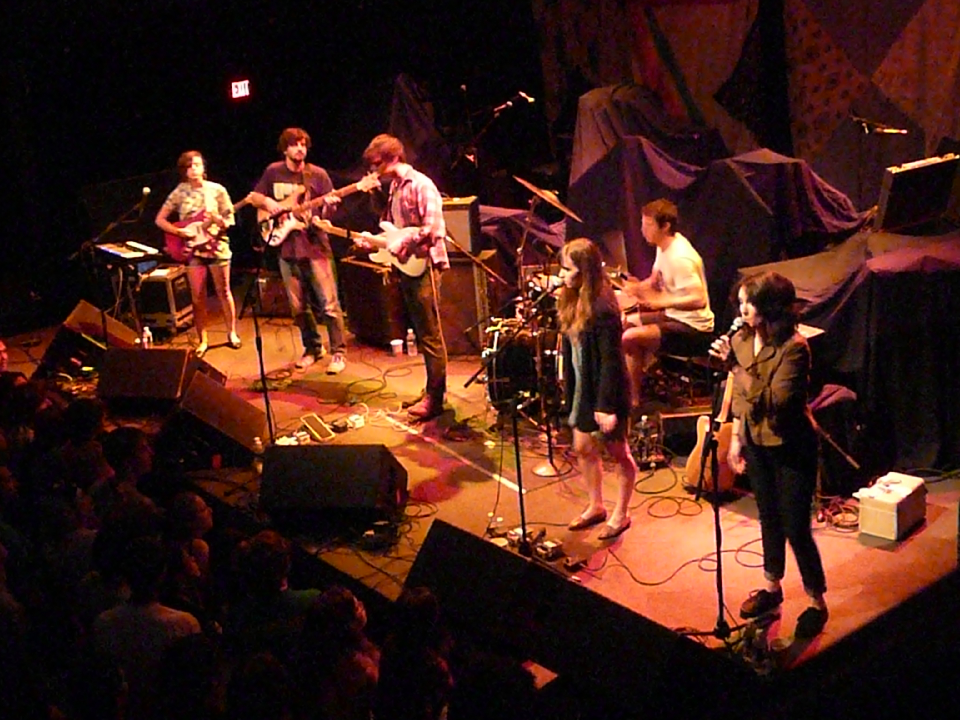 930 Club, DC